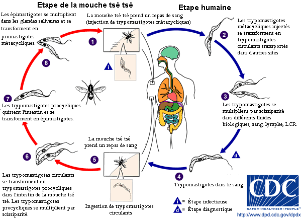 Traduction en français de l’image suivante: Description du cycle parasitaire du trypanosome Hastily corrected some typos and errors in text.--A3 nm (talk) 17:39, 16 June 2008 (UTC)